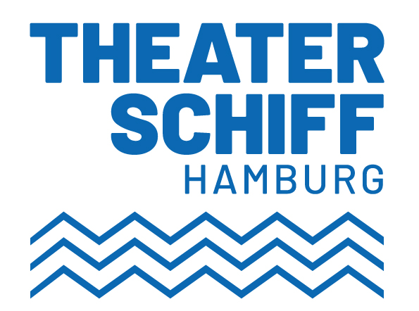 Theaterschiff Hamburg - Nikolaifleet